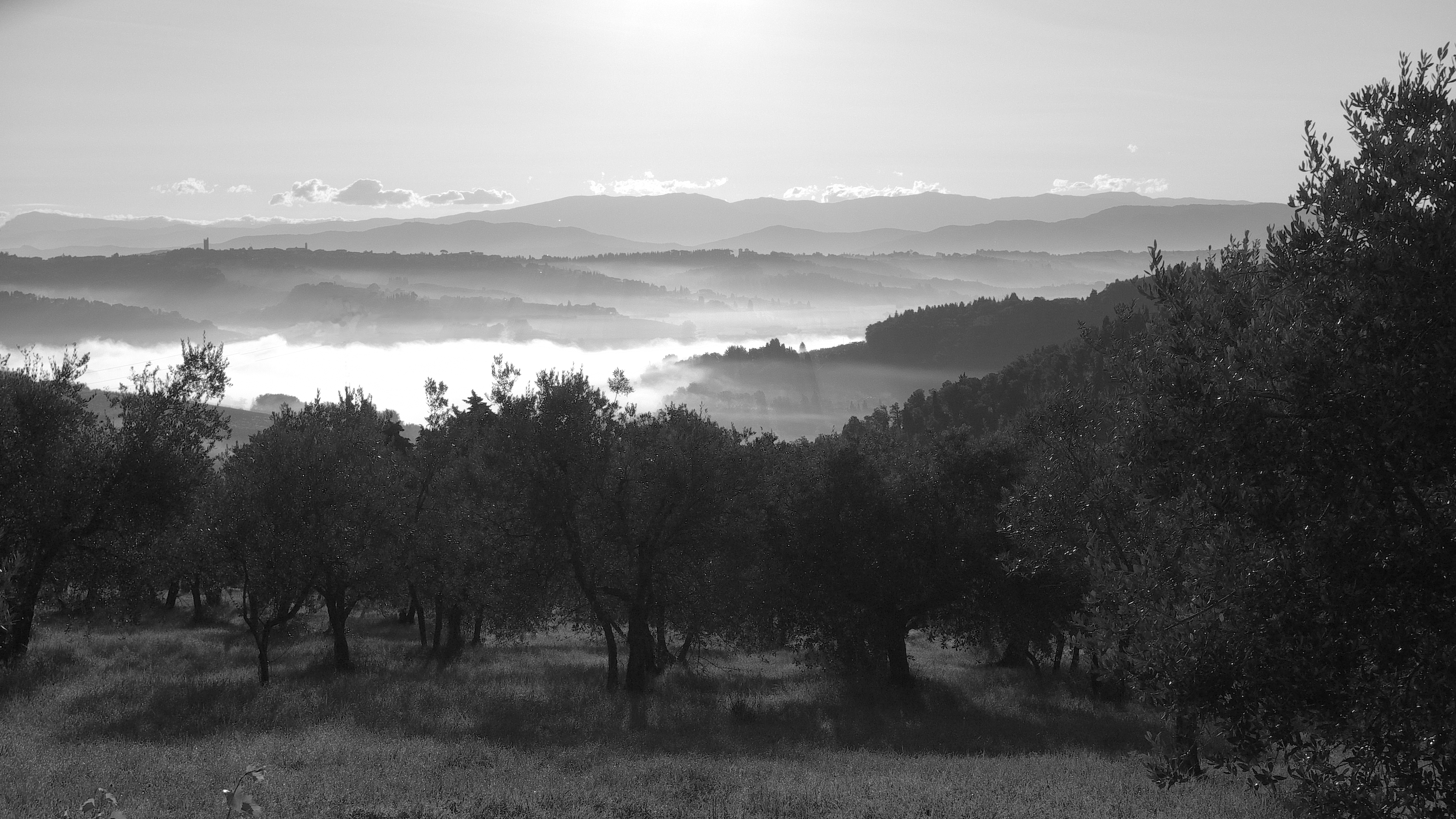 San Casciano e bassa val di Pesa da San Quirico